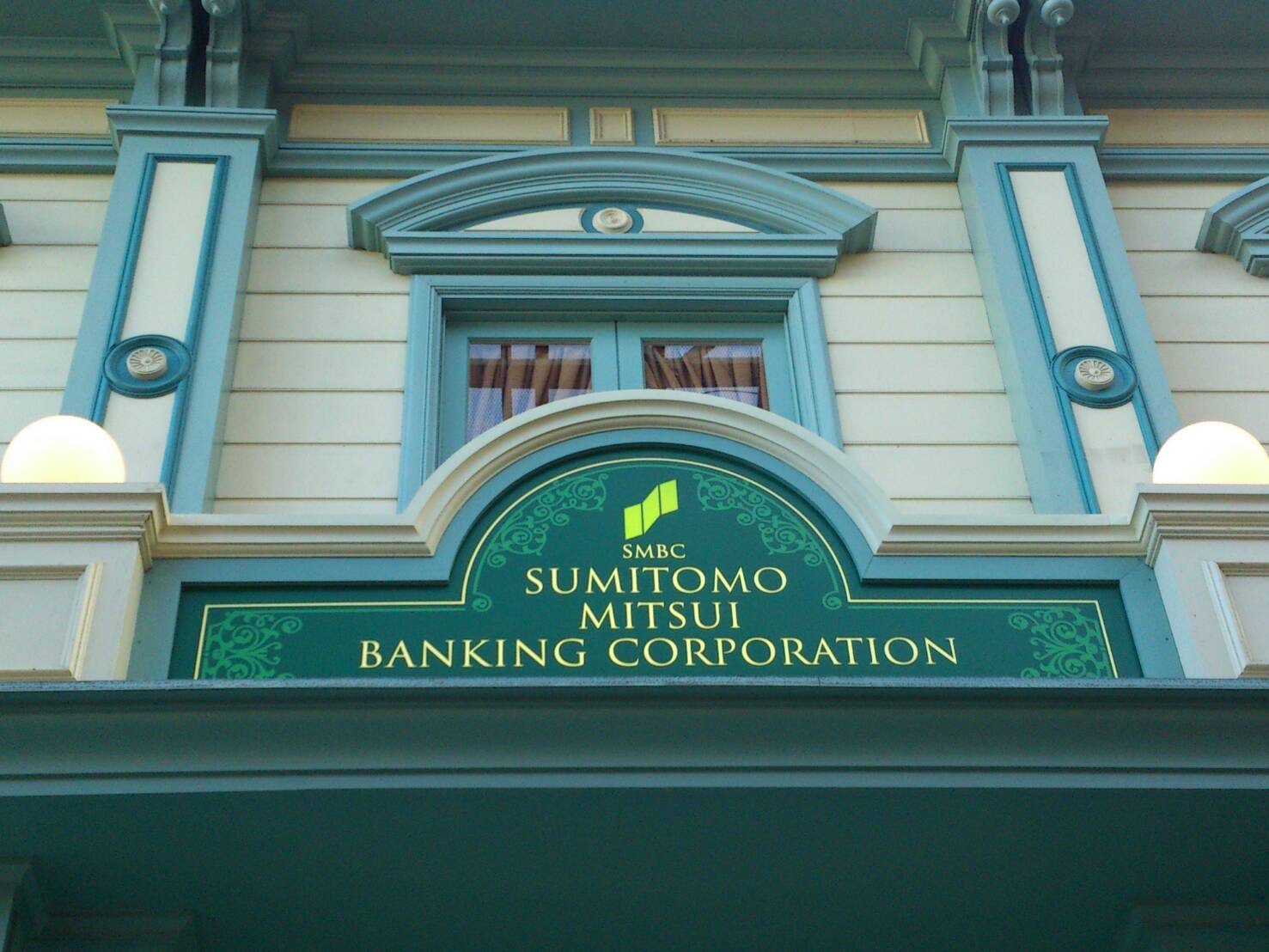 三井住友銀行 ワールドバザール